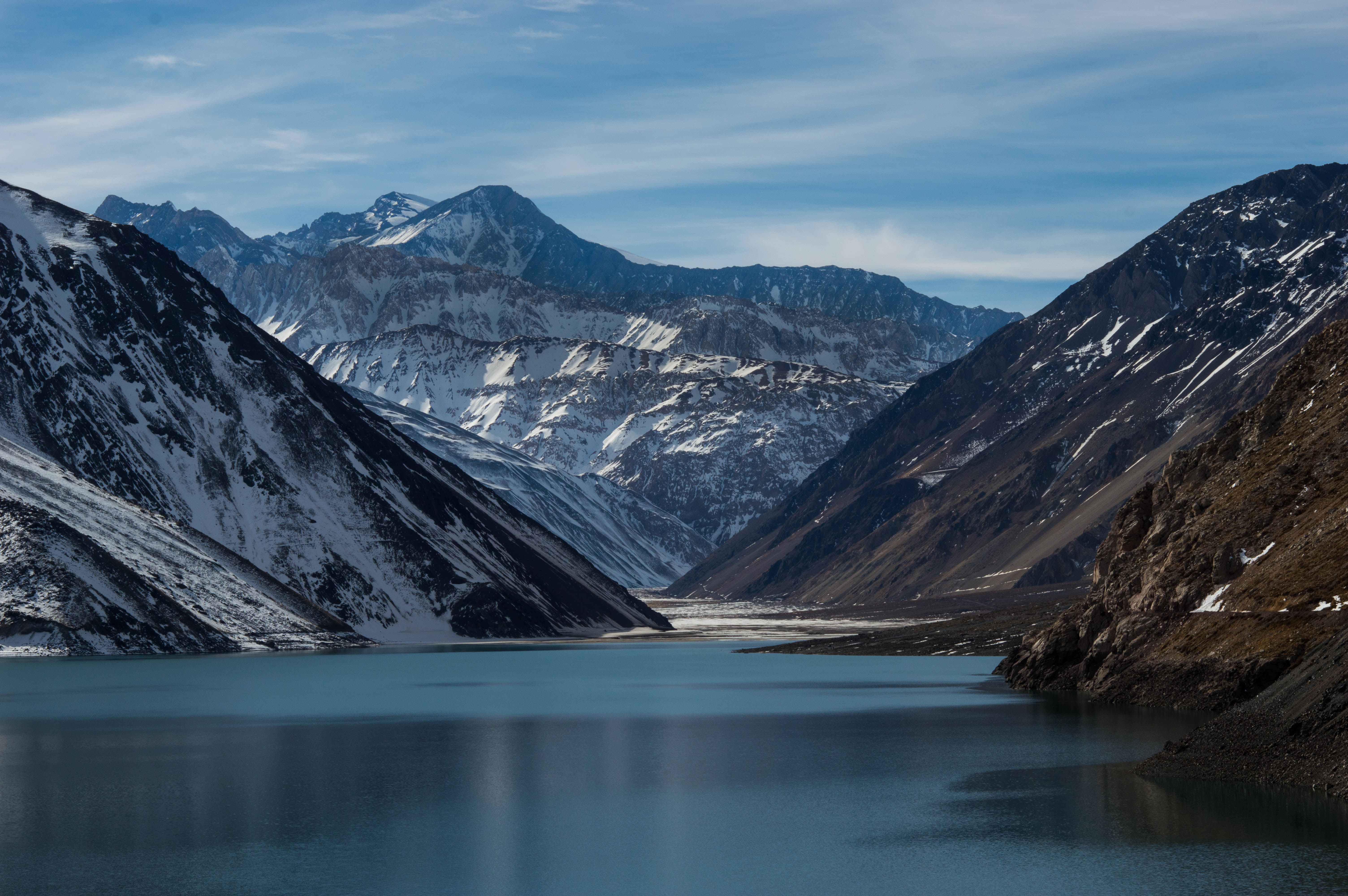 O rio Maipo é um rio sul-americano que banha o Chile. Ele nasce nas encostas do vulcão Maipo a 5.523 m.s. e cobre uma extensão de 250 quilômetros até que deságua no Oceano Pacífico, cobrindo uma superfície ligeiramente superior a 15.000 km². O rio Maipo dá origem à principal bacia hidrográfica da Região Metropolitana de Santiago (no Chile). Do ponto de vista da conservação da biodiversidade, a área andina do Cajón del Maipo foi proposta como área prioritária pela CONAMA no âmbito da Estratégia Nacional para a Conservação da Biodiversidade.